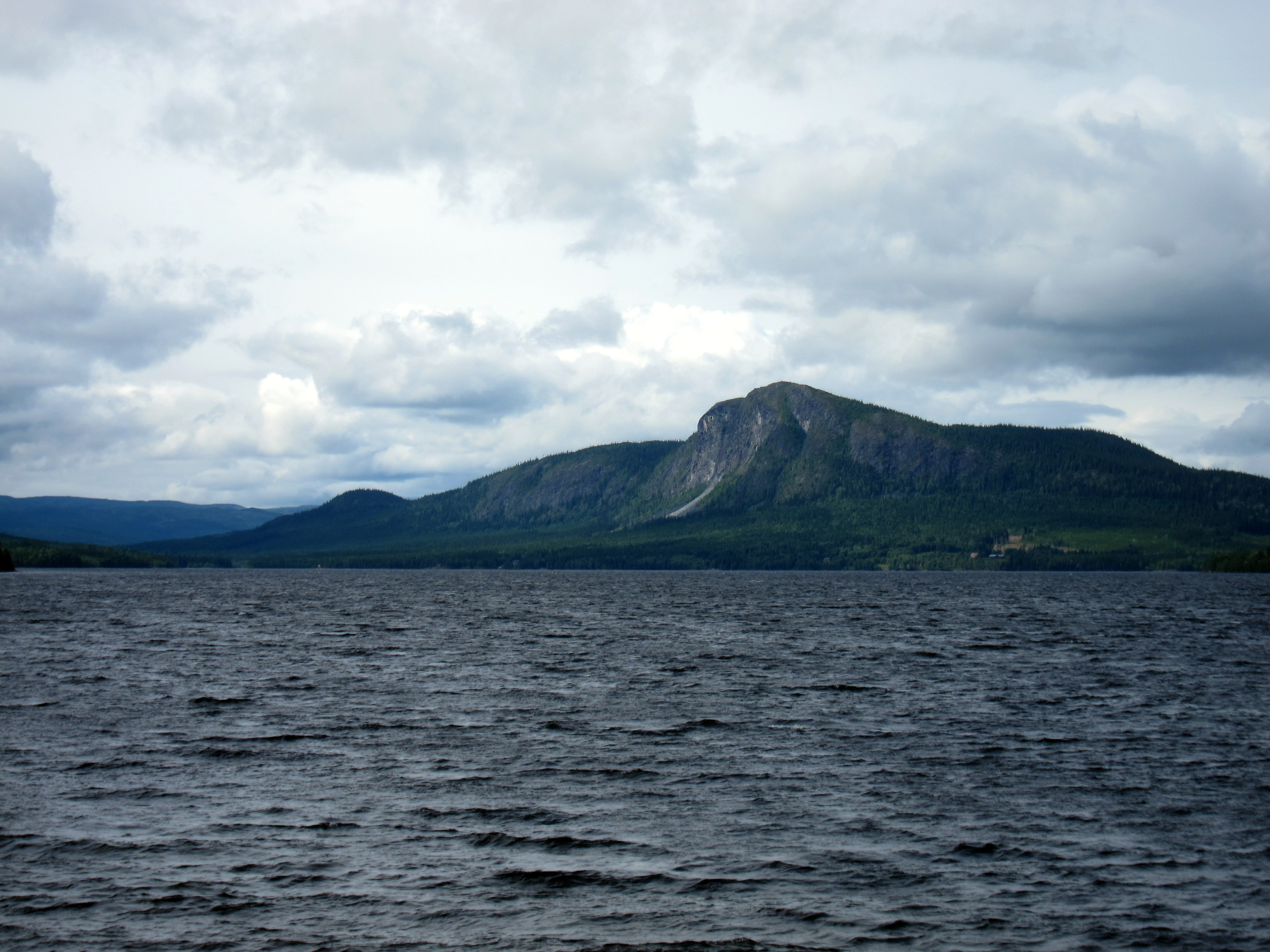 Hetögeln